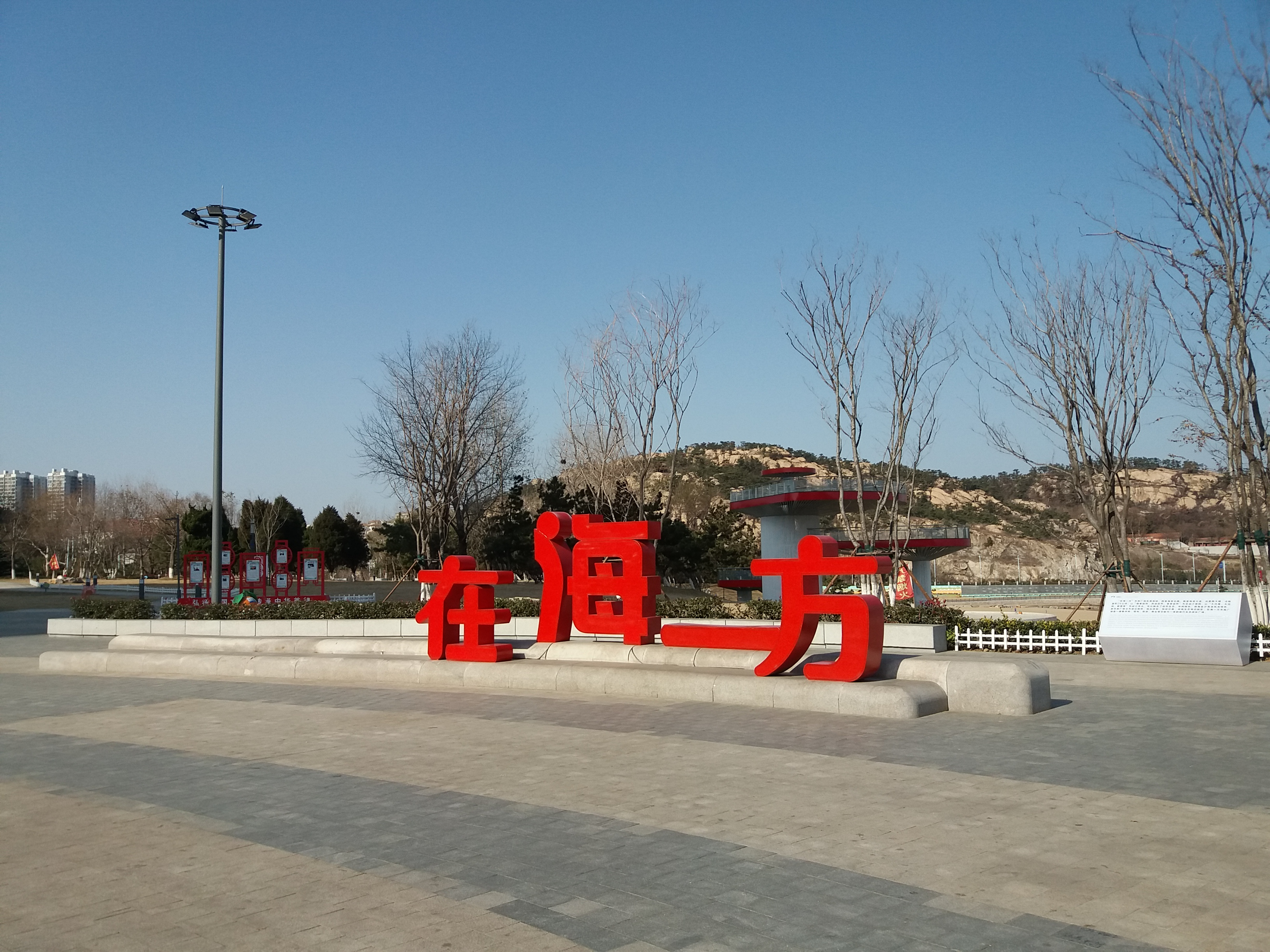 连云港在海一方公园